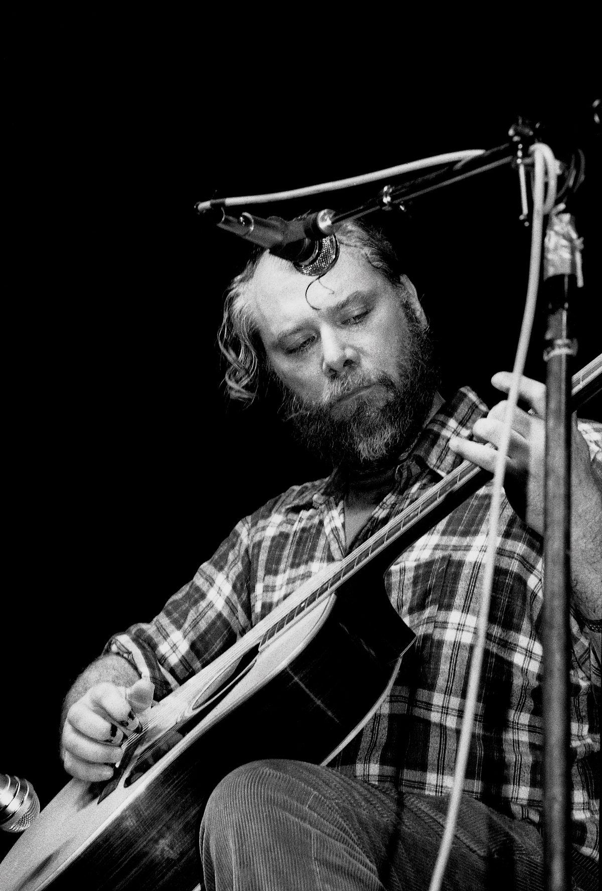 Picture of John Fahey took in Paris in 1984 during a gig Credit Pascal Chassin